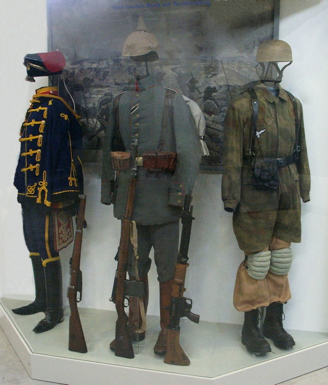 Bundeswehrmuseum Dresden